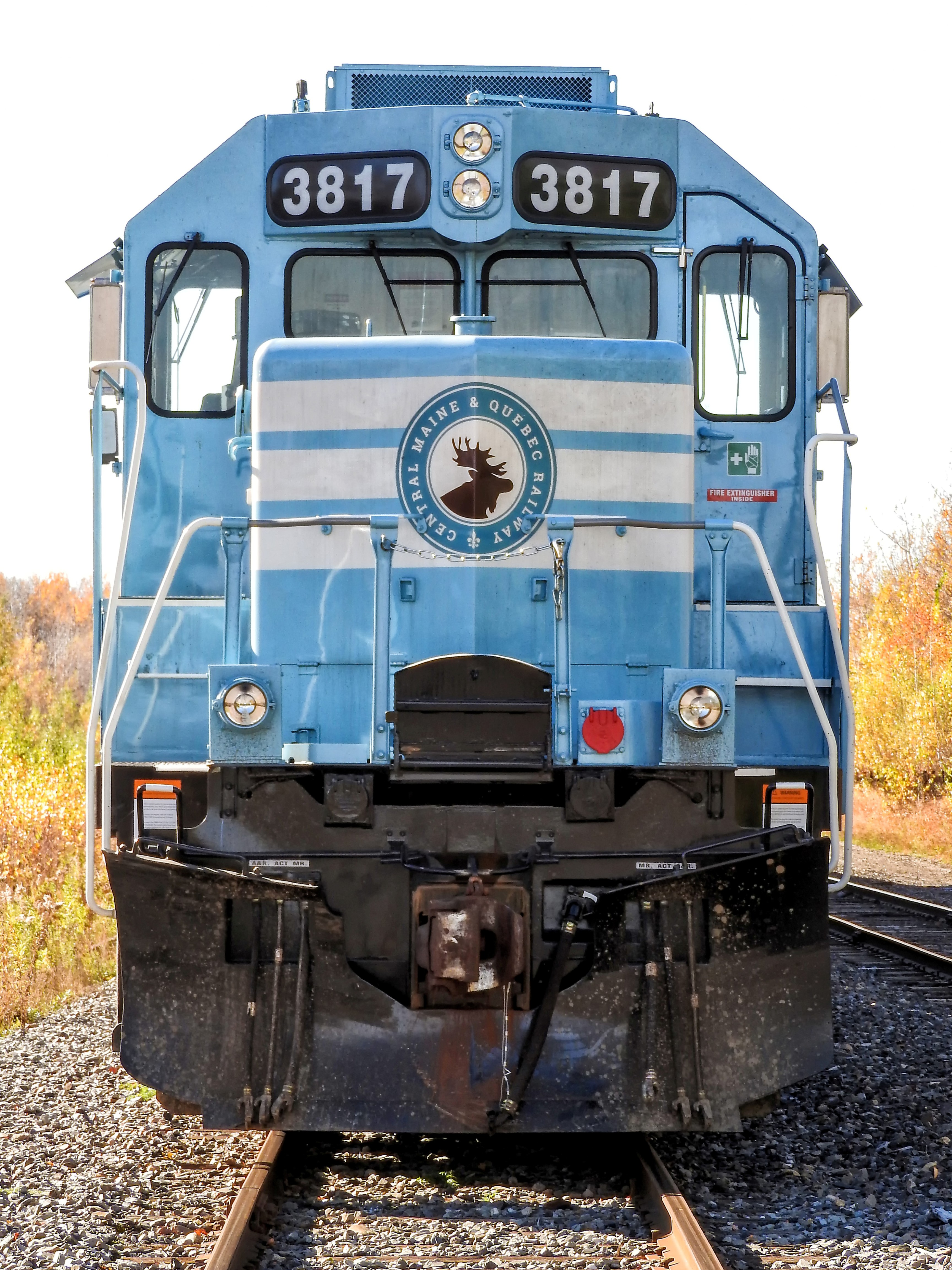 Chemin De Fer 132